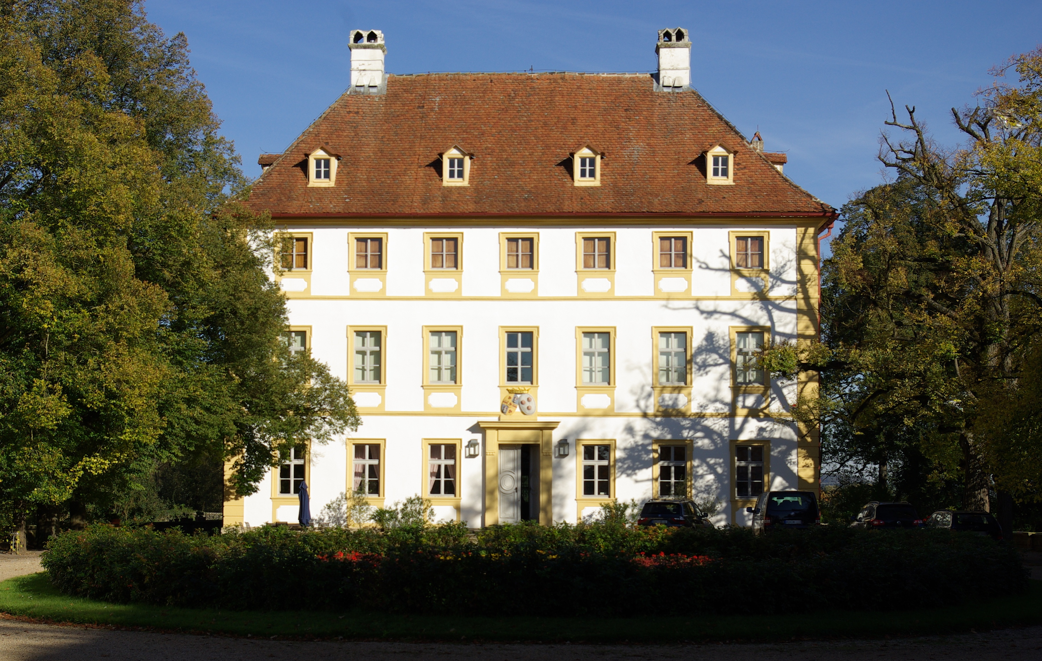 Schloss Ullstadt, Hauptgebäude